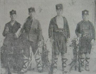 Недялко Килев, Щерю Георгиев, неизвестен и Атанас Тропчов (Тропчев), Чепеларе, 1899 година.